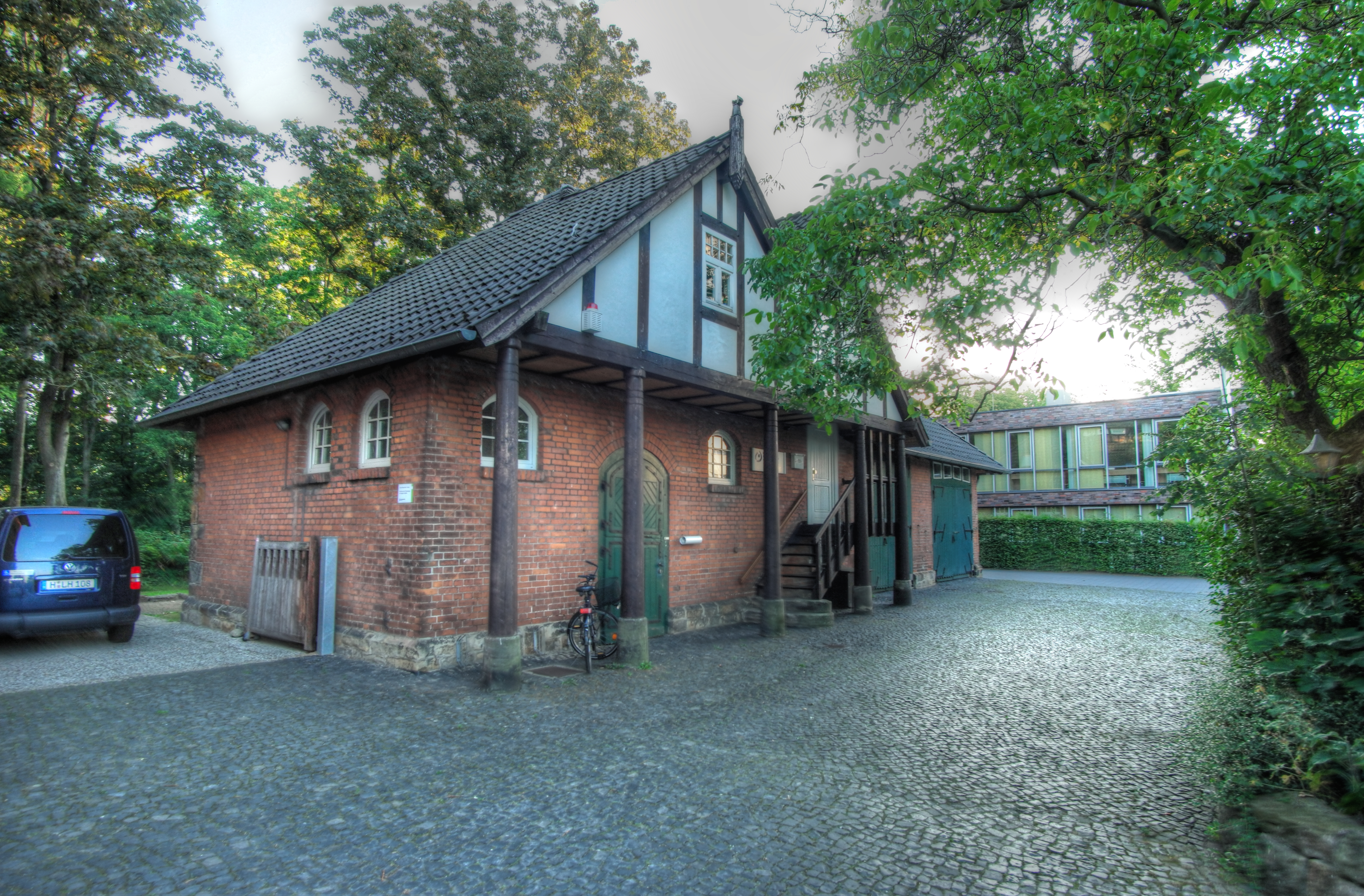 Deutschland Niedersachsen Hannover Kirchrode Bünteweg 3, 30559 Hannover Nebengebäude